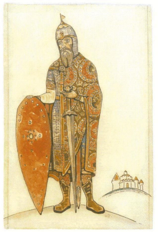 Князь Игорь. Эскиз к опере «Князь Игорь» А.П.Бородина, 1914